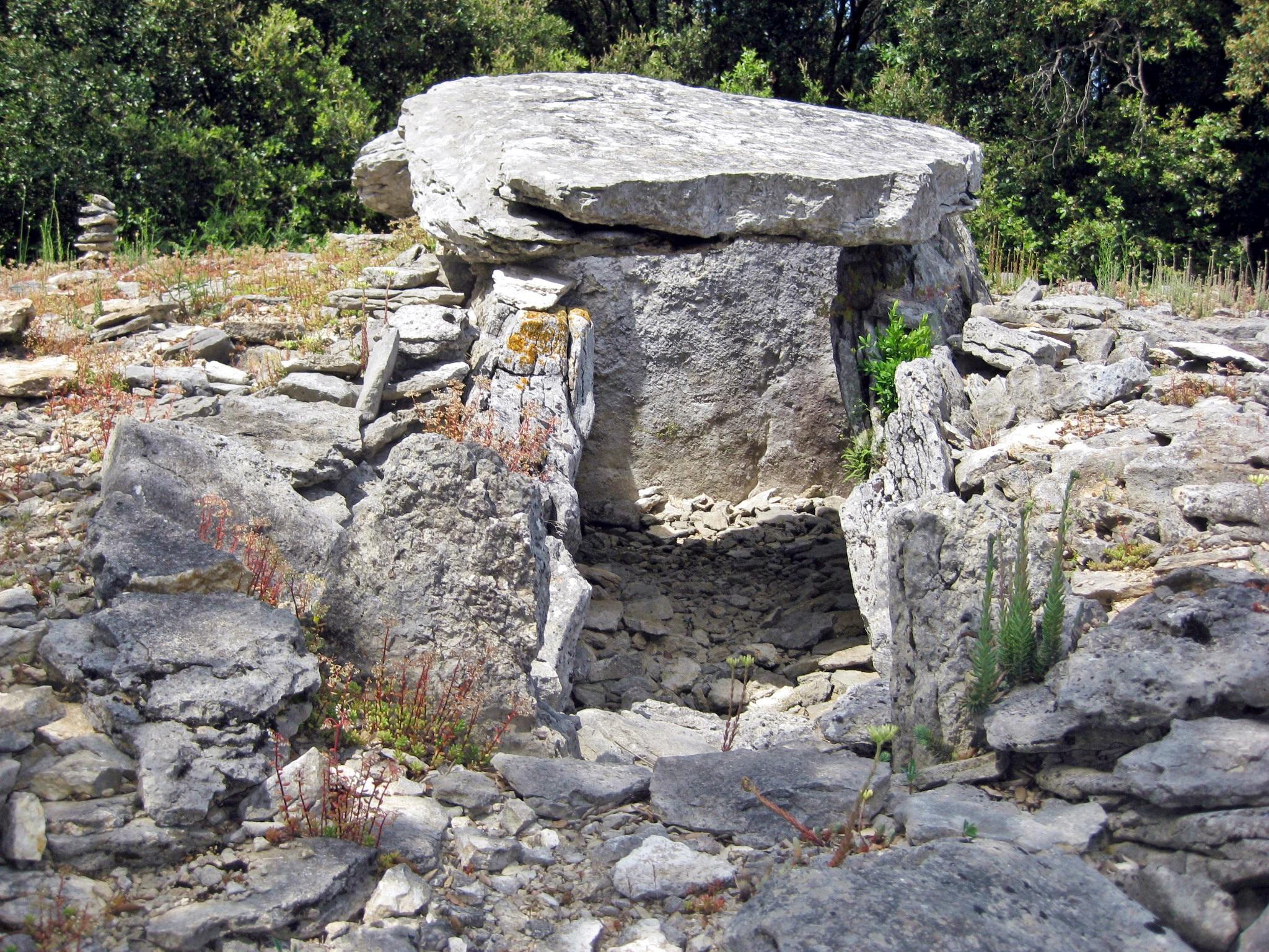 Dolmen IIIa D358 © by Besenbinder